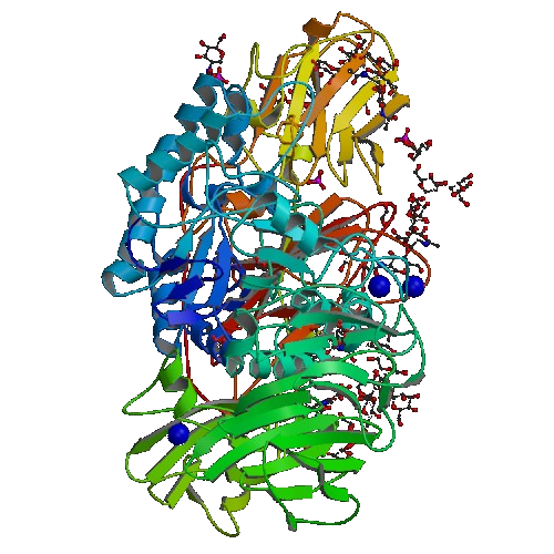 Beta-galactosidase from Penicillum sp.